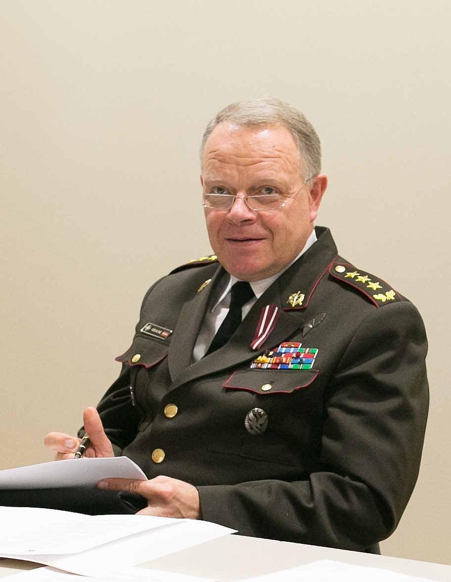 2015.gada 9.novembris. Fotogrāfiju konkursa „Tev mūžam dzīvot, Latvija!” izvērtēšanas komisijas sēde. Foto: Ernests Dinka, Saeimas Administrācija Izmantošanas noteikumi: saeima.lv/lv/autortiesibas